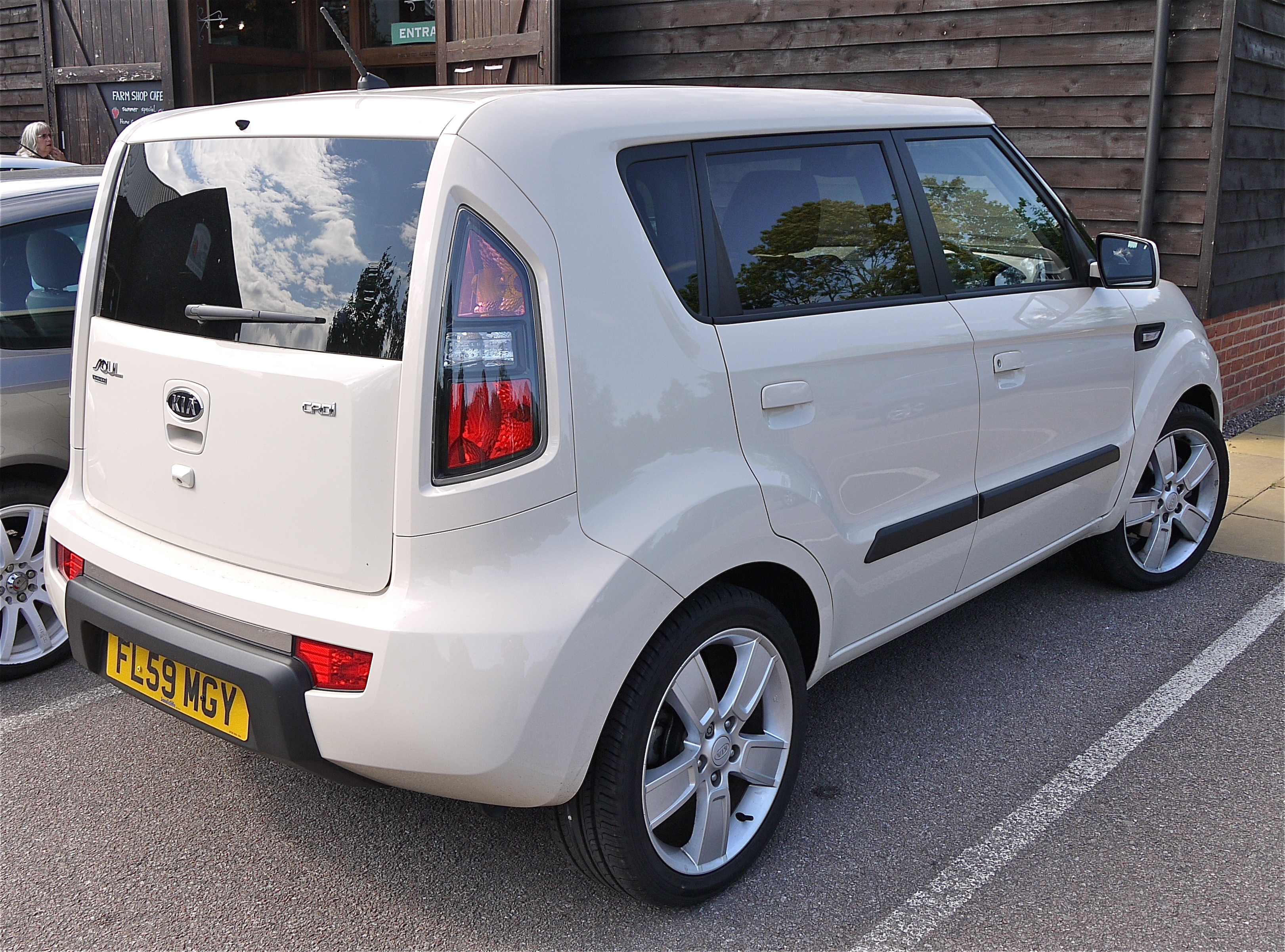 Panasonic G1 14-45 Lens